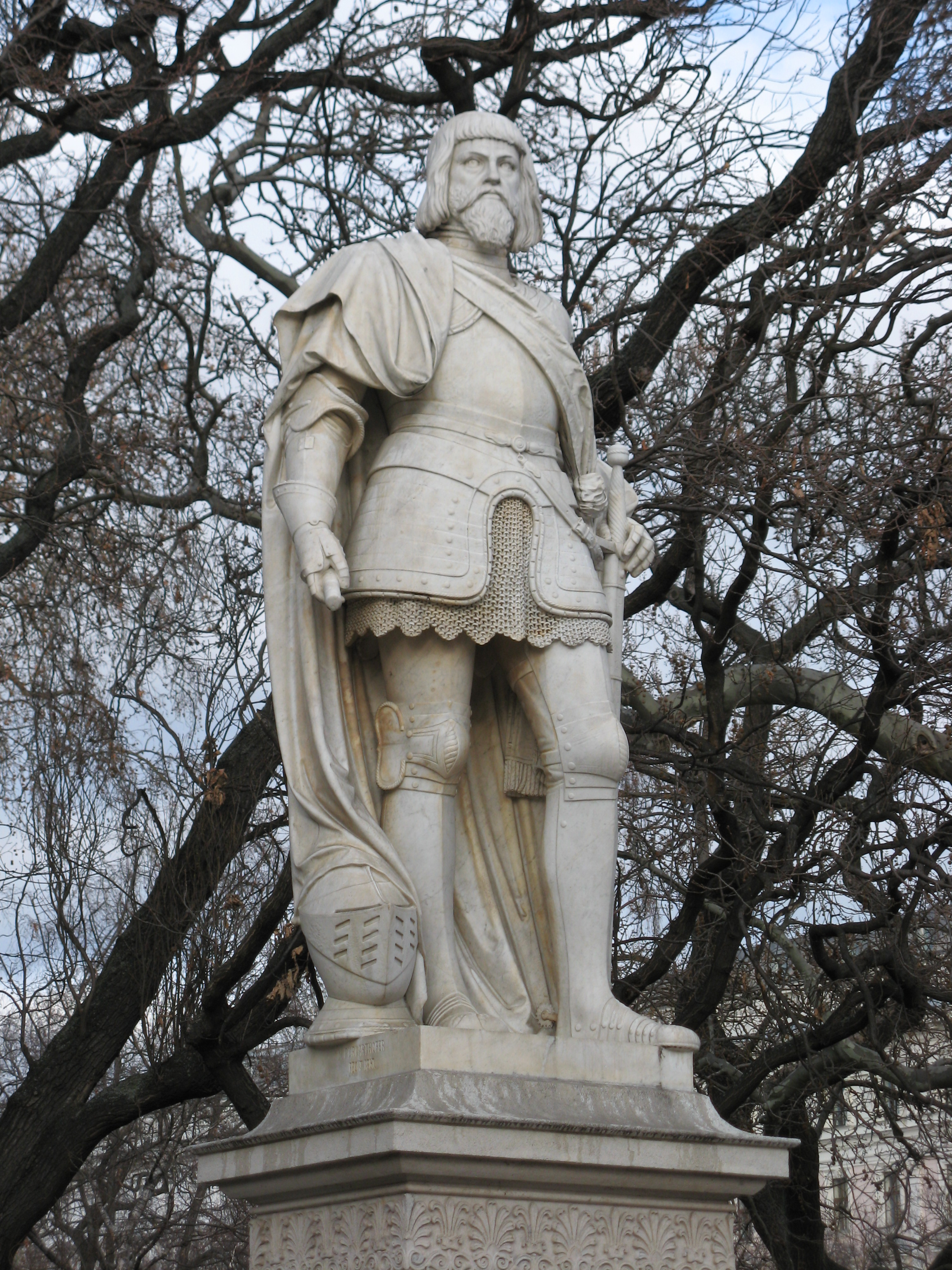 Niklas Graf Salm (1867) von Matthias Purkartshofer, Rathausplatz, Wien-Innere Stadt